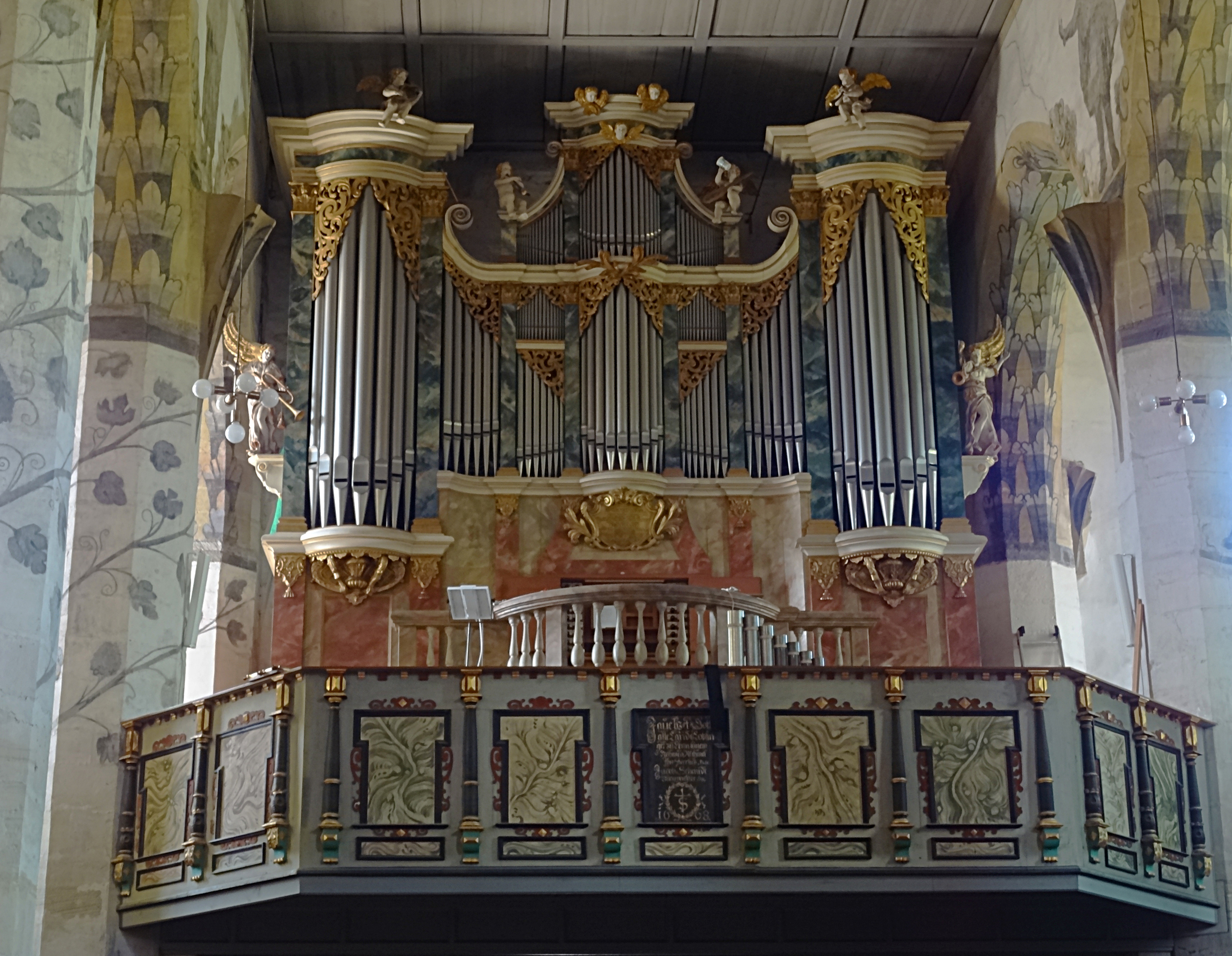 Orgel der Jakobikirche (Sangerhausen) von Zacharias Hildebrandt (1728) IIP/30